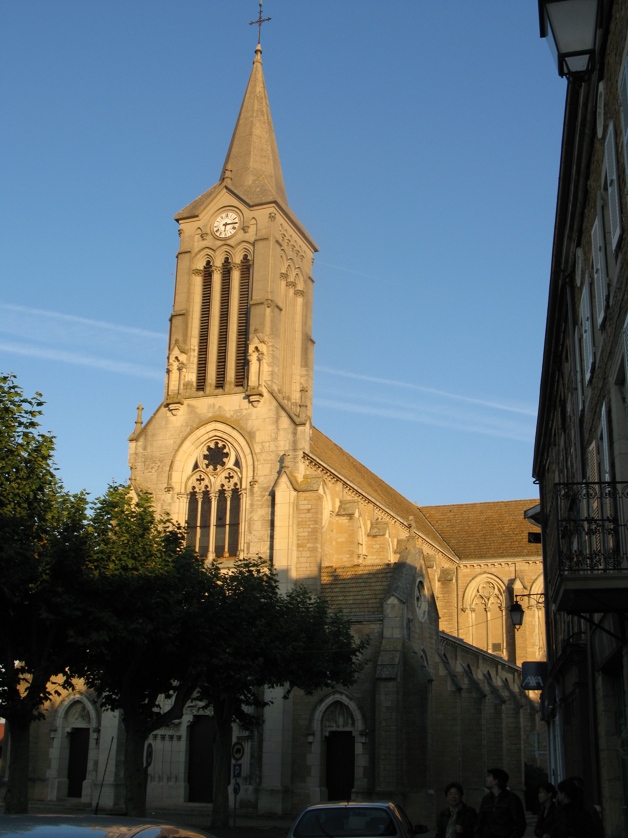 La Chapelle-de-Guinchay dans le département français Saône-et-Loire : église.